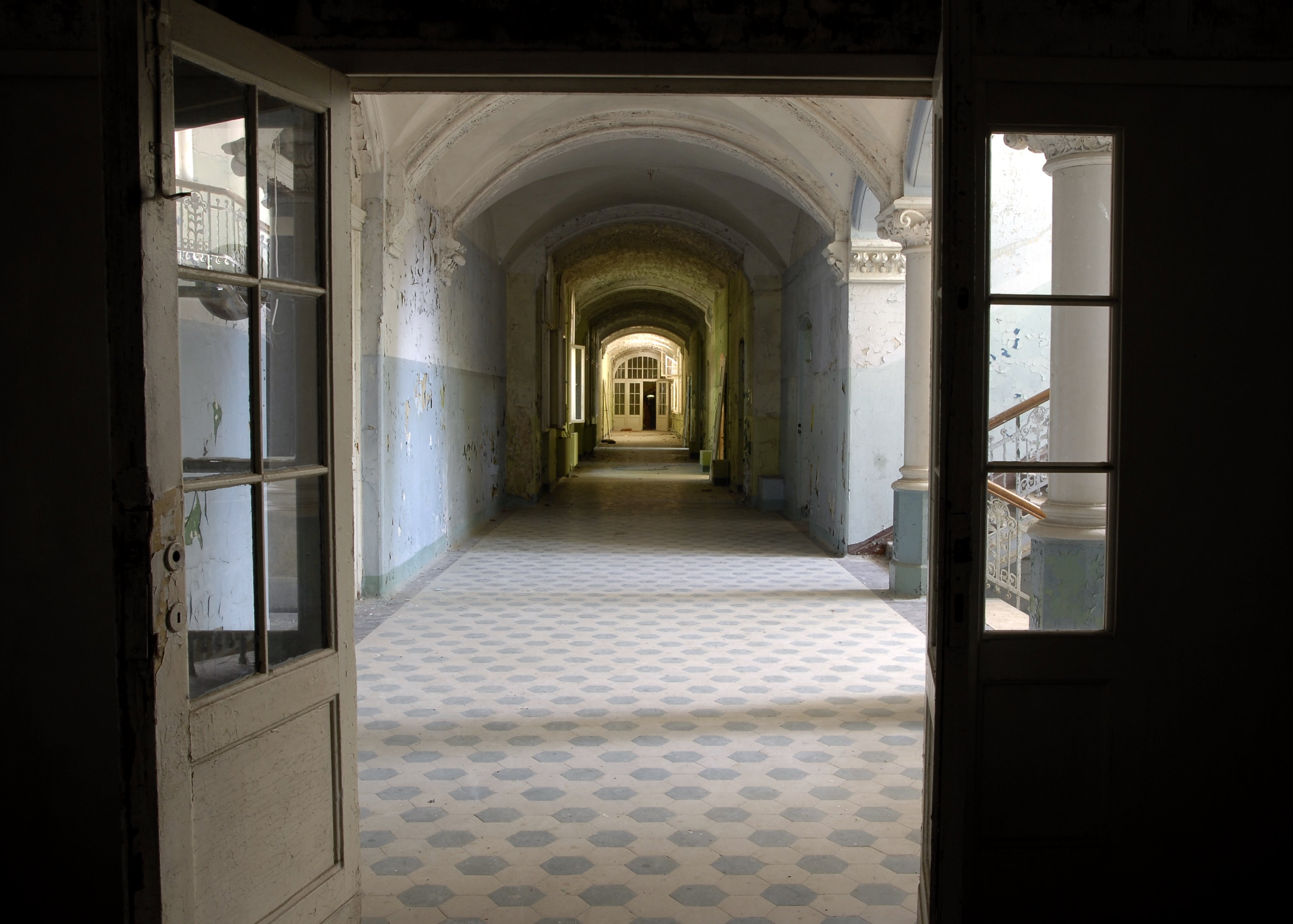 Beelitz Sanatorium